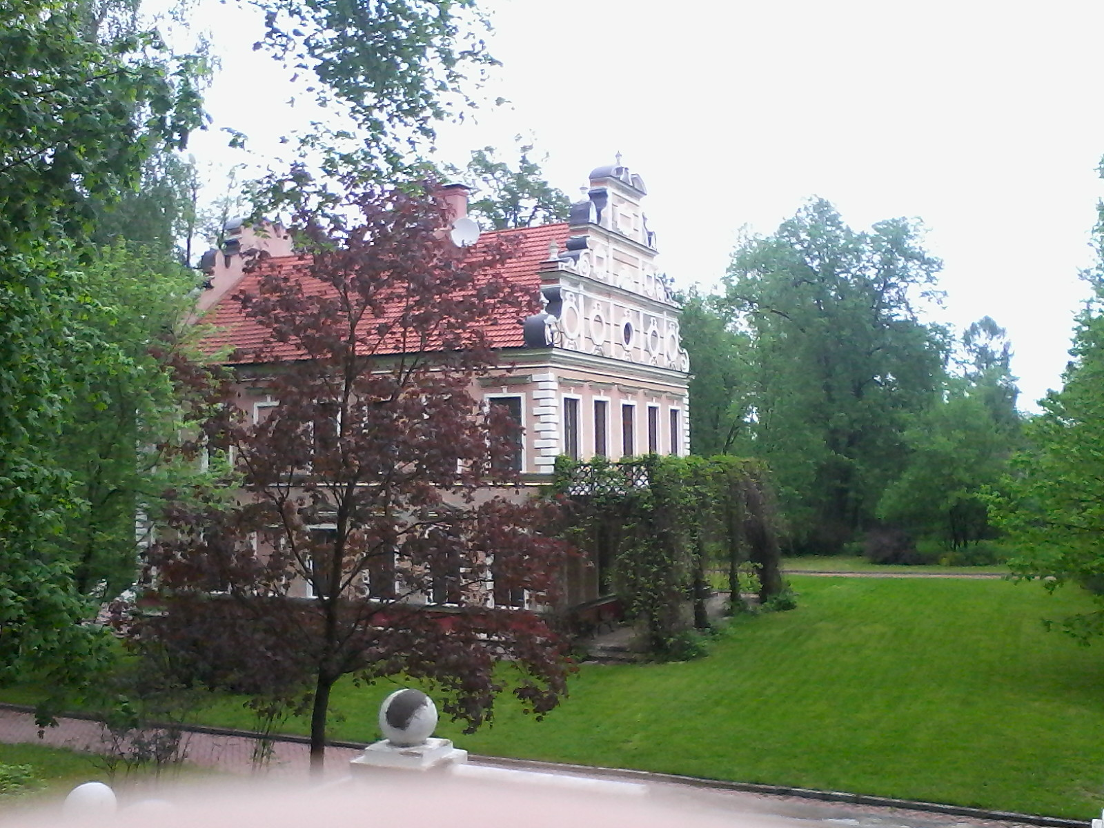 Голландский домик: Вороново, Троицкий округ, Москва